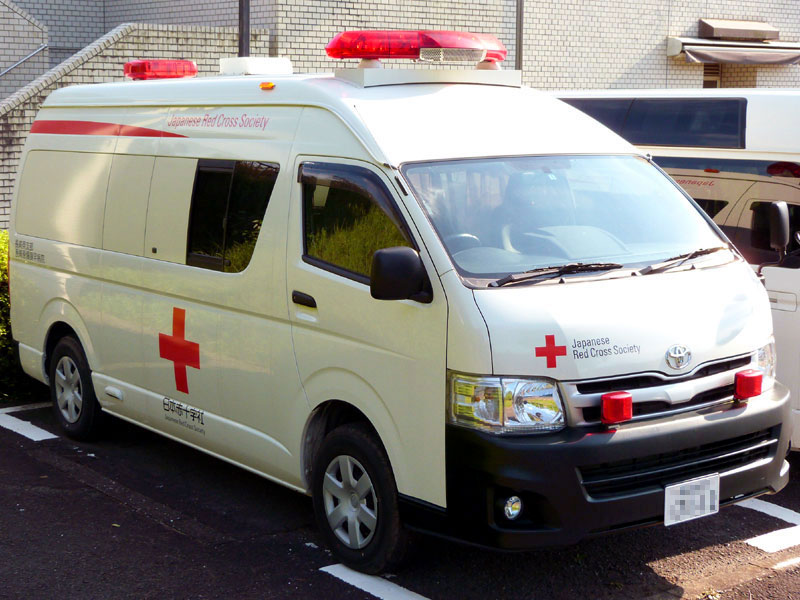 赤十字 長崎原爆病院の救急車